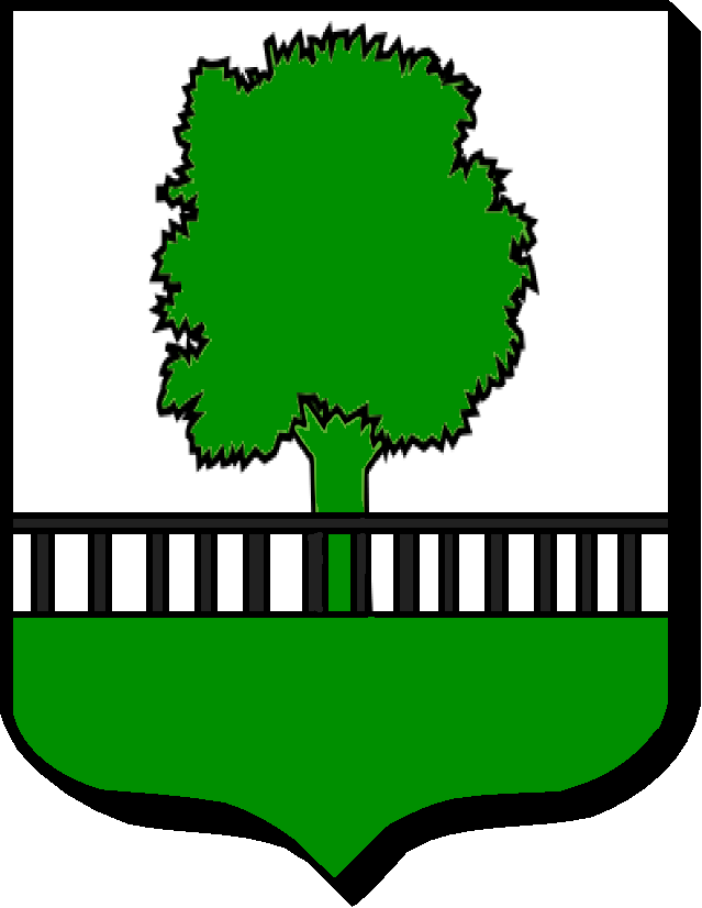 D'argent, à un arbre (nard) de sinople, terrassé du même, et une haie à claire-voie de sable posée en fasce, mouvant de la terrasse et brochant sur l'arbre.